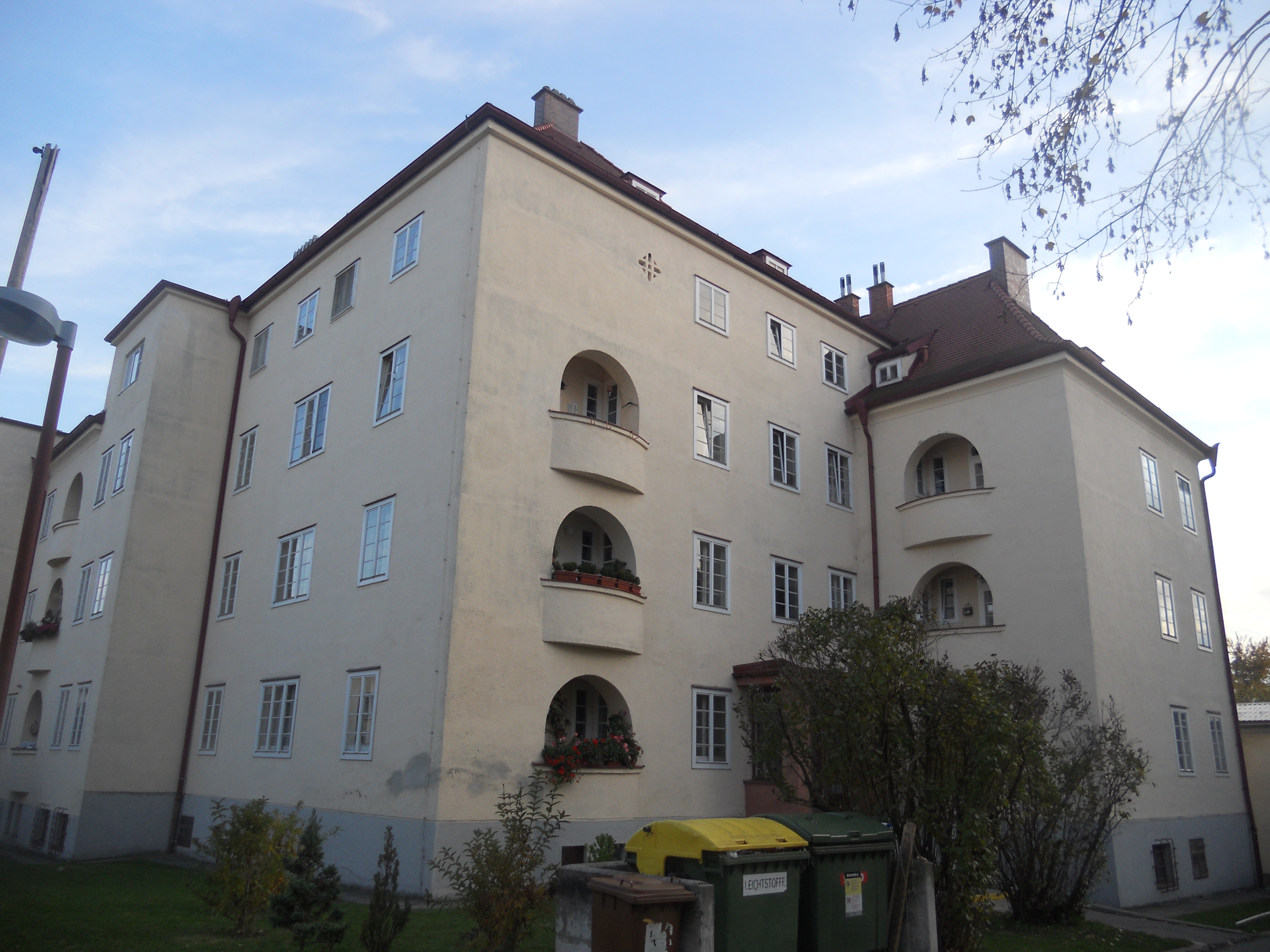 Kommunaler Wohnbau, Teil d. Beamtensiedlung